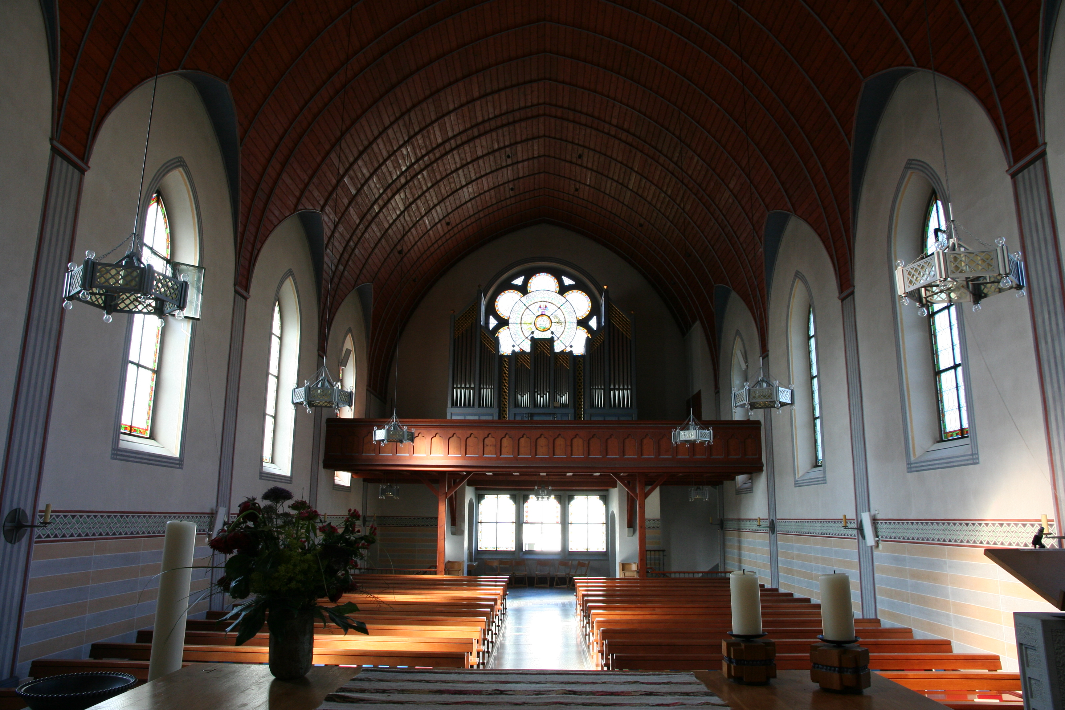 Römisch-katholische Pfarrkirche St. Stephan Männedorf